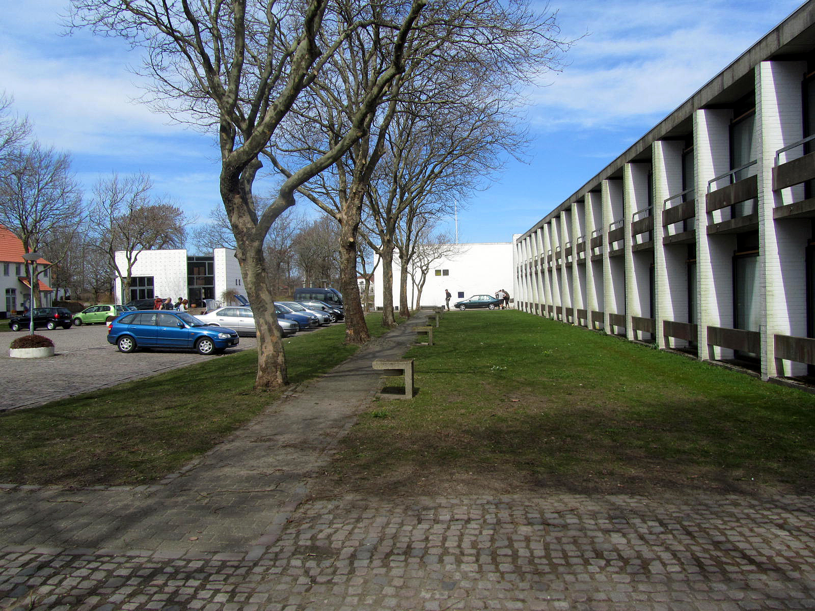 Brandbjerg Højskole